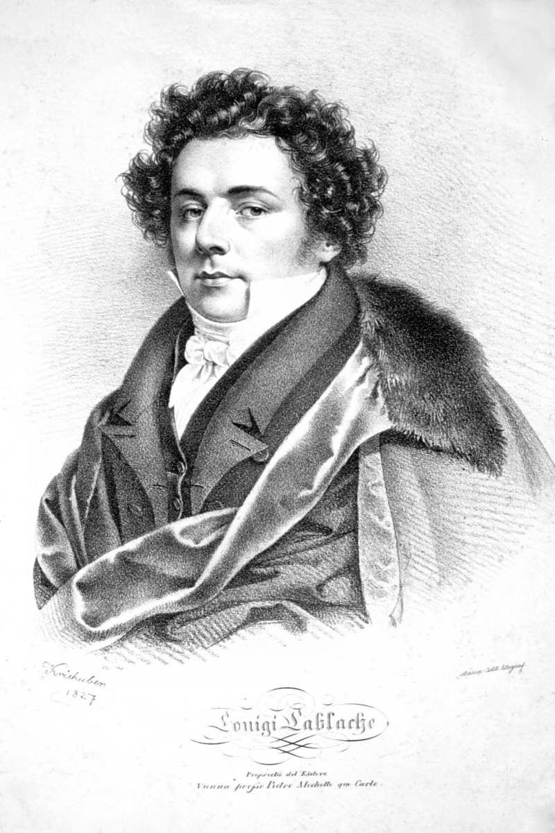 Luigi Lablache, Lithographie von Josef Kriehuber